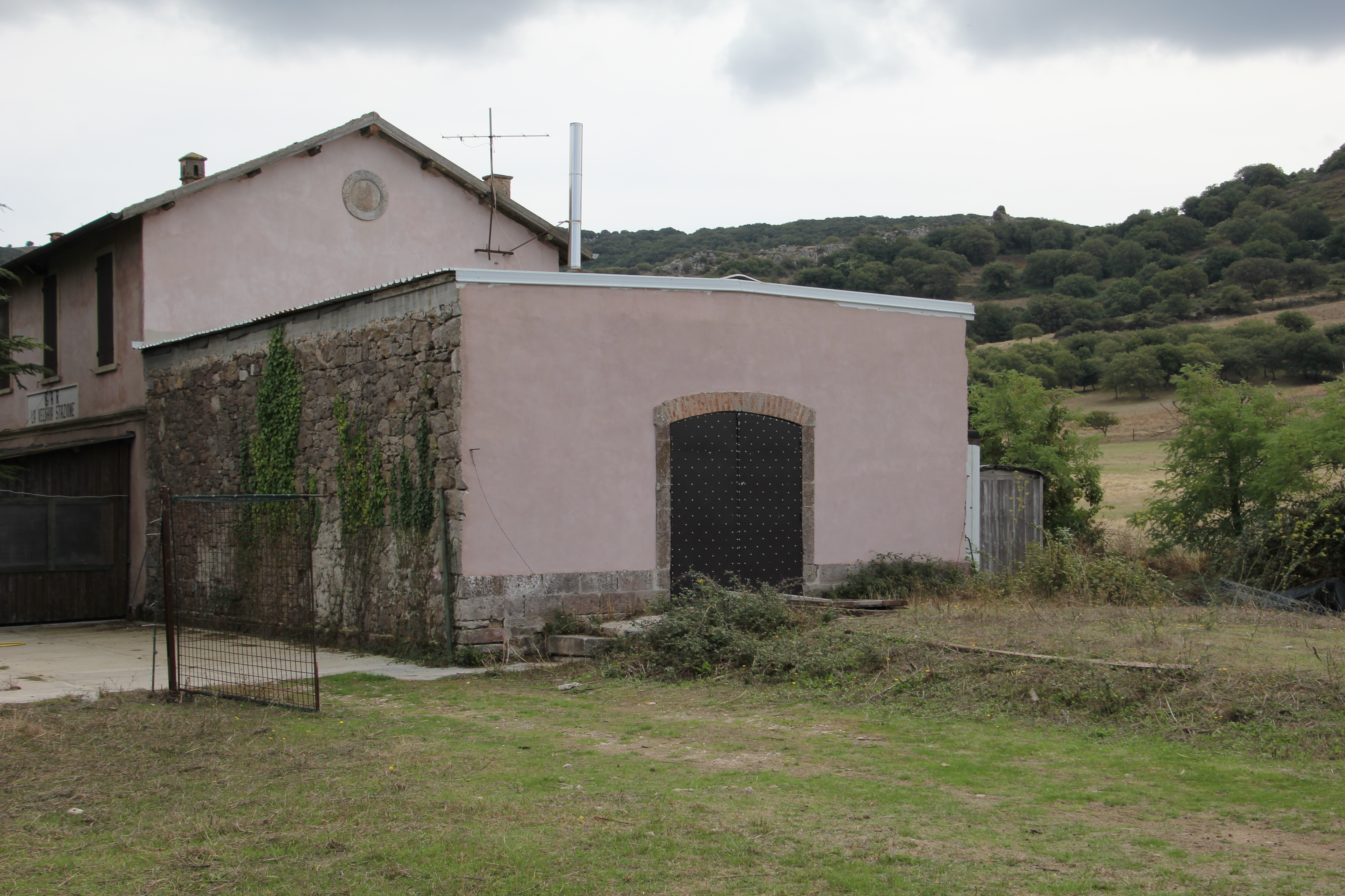 Pattada, la vecchia stazione ferroviaria